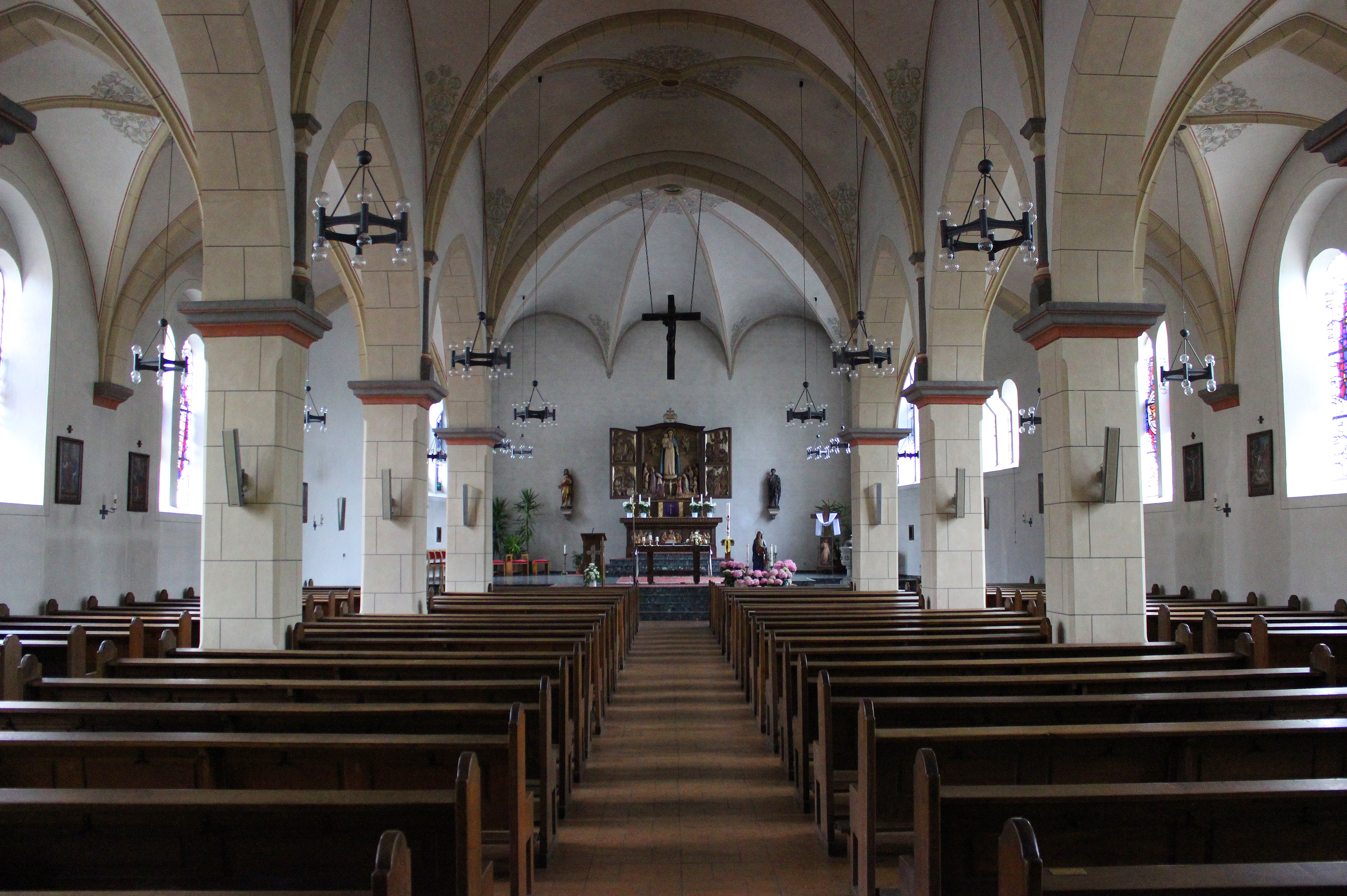 Blick ins Innere der katholischen Pfarrkirche Mariä Himmelfahrt in Humes, einem Ortsteil der Gemeinde Eppelborn, Landkreis Neunkirchen, Saarland.